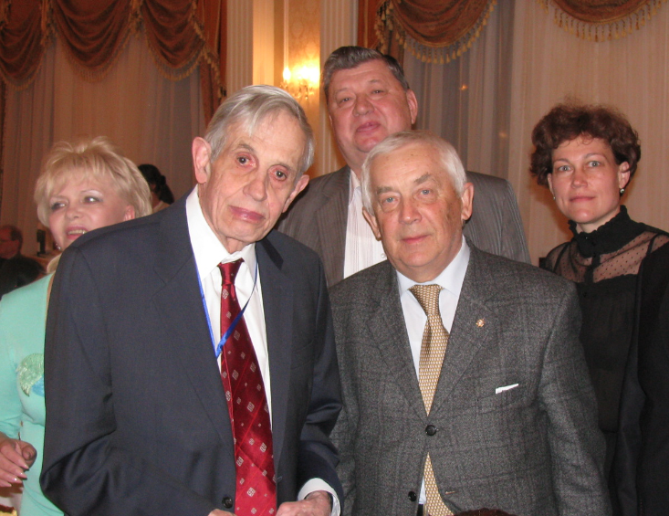 В.И. Кушлин с лауреатом Нобелевской премии по экономики Дж. Нэшем на Международном экономическом форуме в Астане (2011 г.)